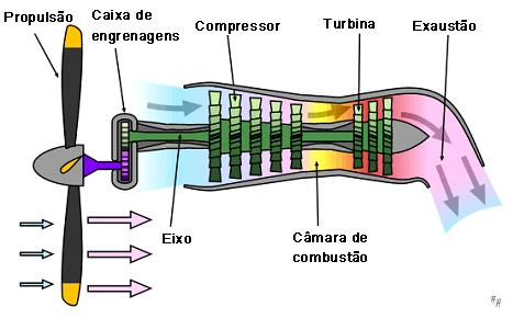 Copiado da Wikipedia em Inglês.